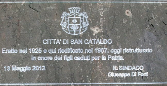 Monumento ai caduti (città di San Cataldo, provincia Caltanissetta)(5).jpg 73 KB